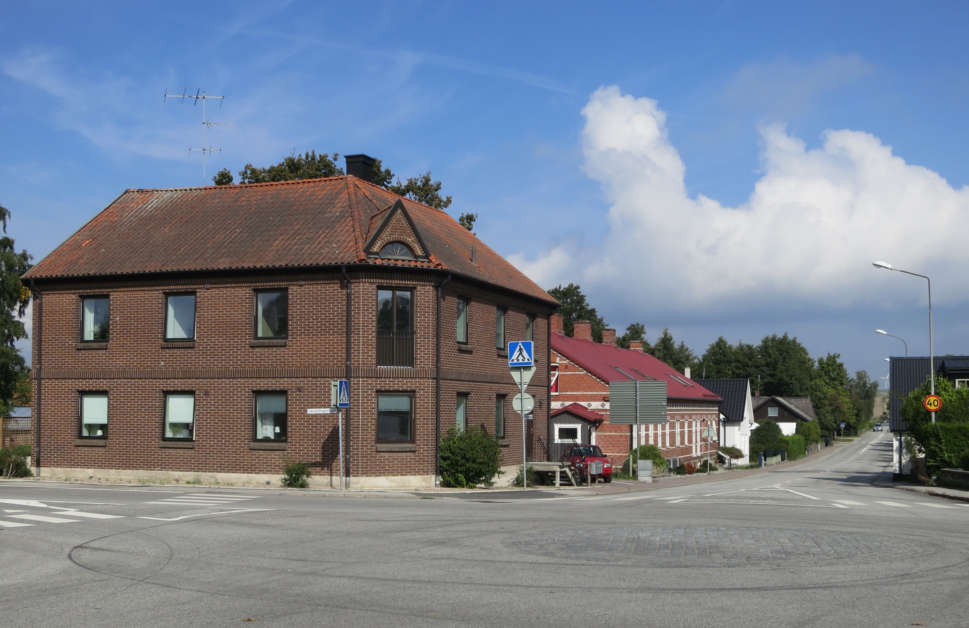 Flyinge samhälle